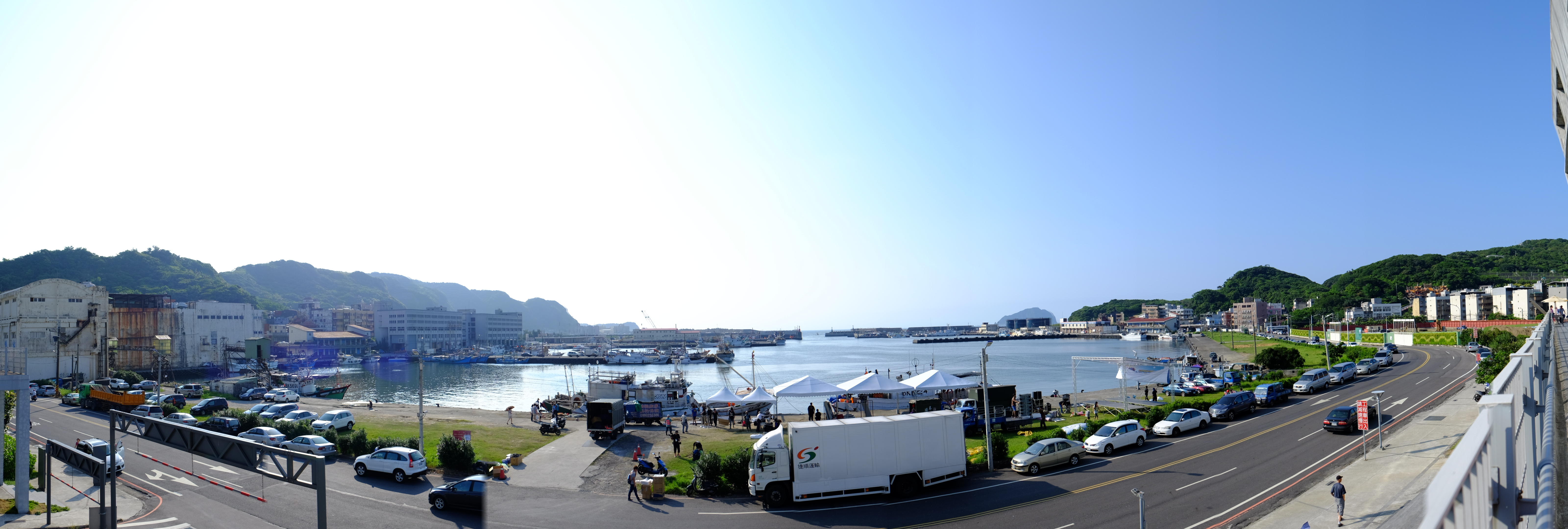 八斗子漁港